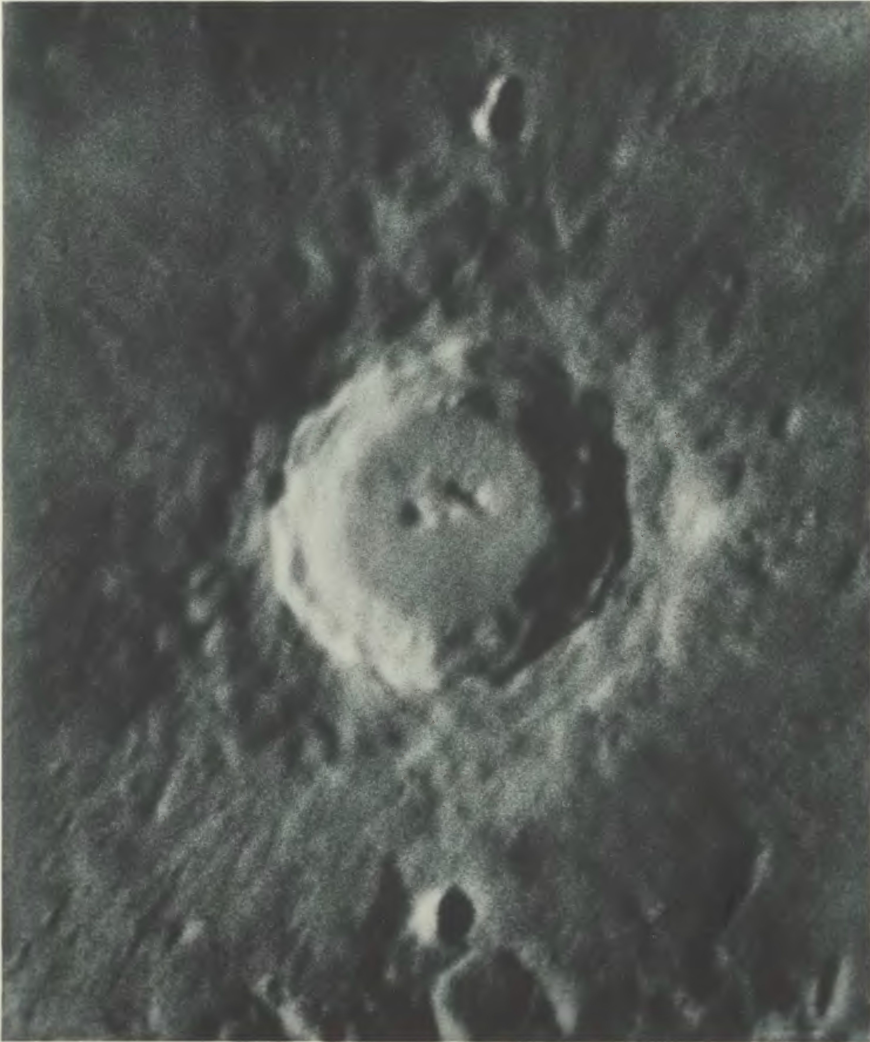 Photographischer Mond-Atlas vornehmlich auf Grund von focalen Negativen der Lick-Sternwarte im Massstabe eines Monddurchmessers von 10 Fuss ausgeführt von Professor Ladislaus Weinek. Heft X. Tafel 186